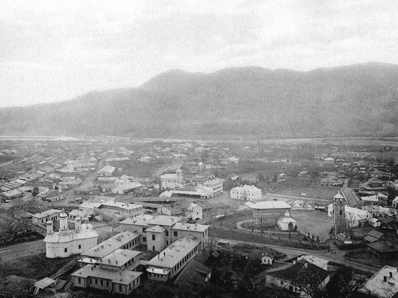 Piatra Neamţ